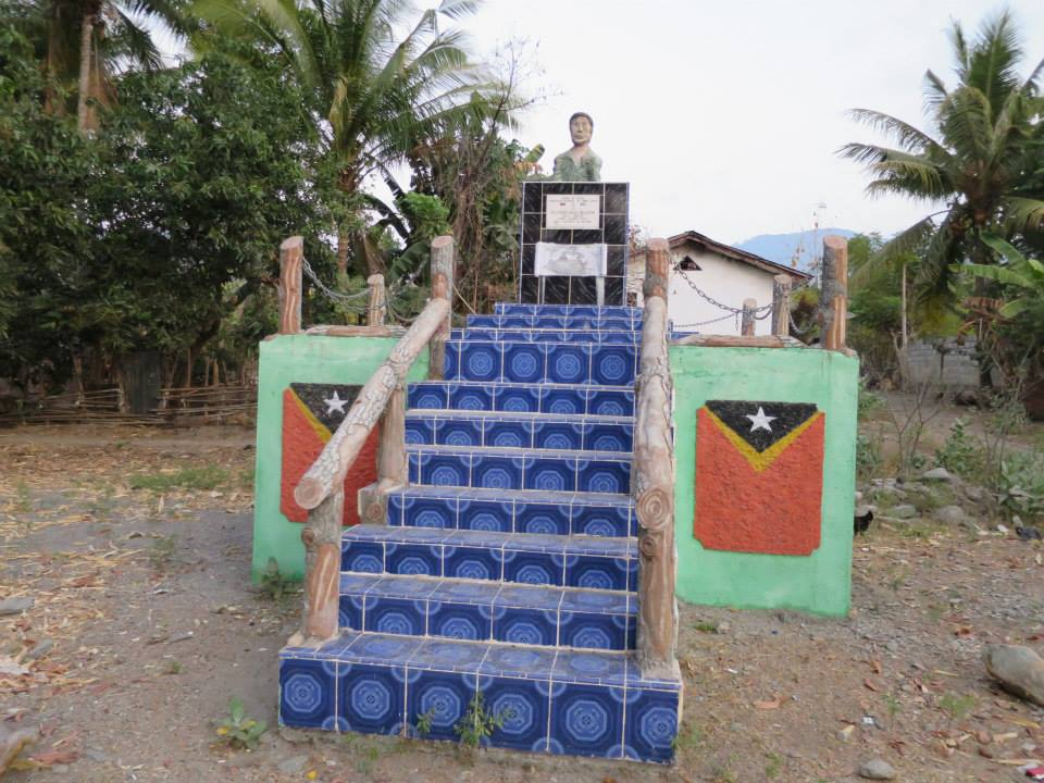 Liquiçá